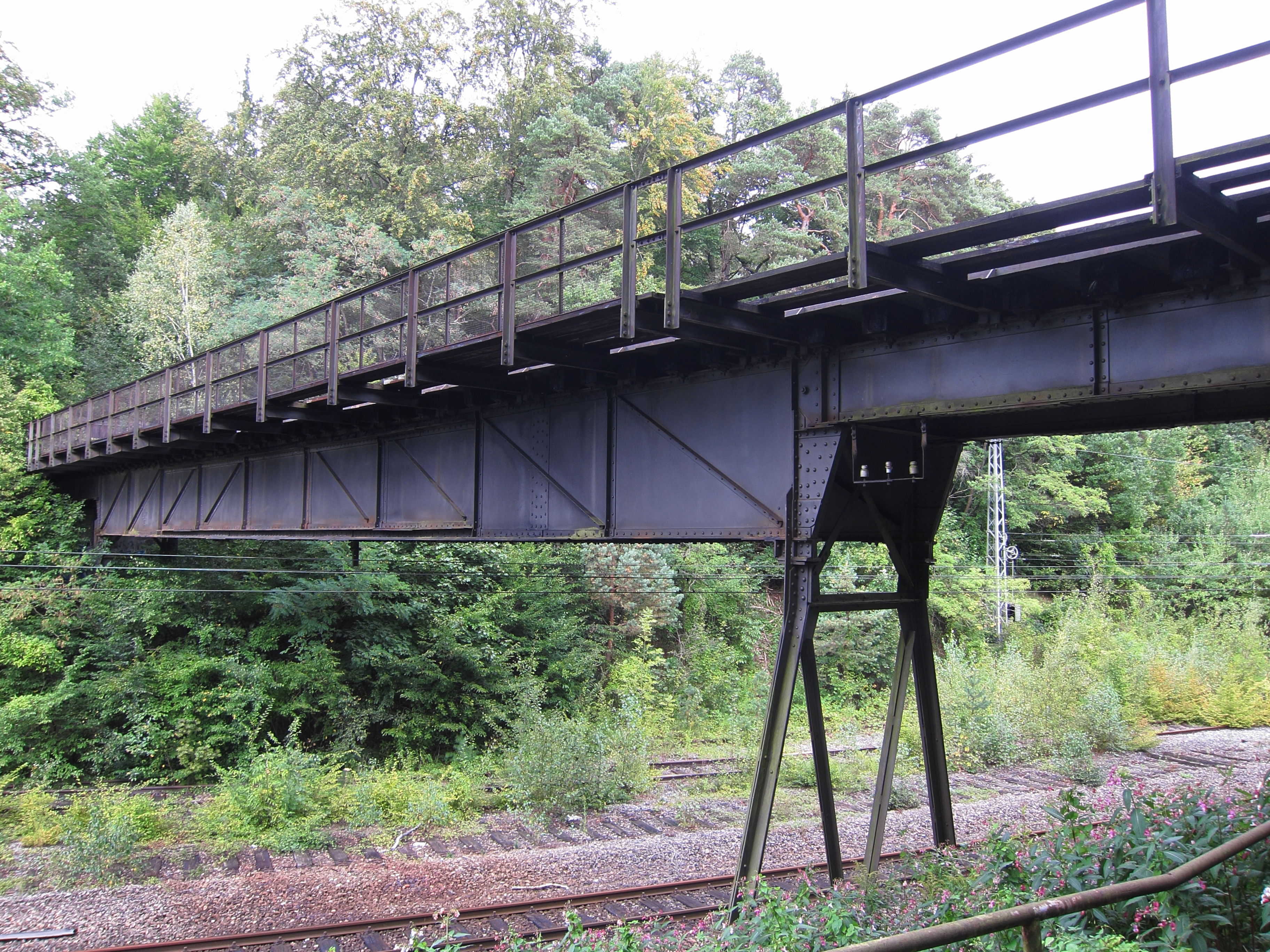 Brücke der Isartalbahn, um 1890 als dreiteilige Eisenkonstruktion zwischen betonierten Widerlagern errichtet; Teil der 1891 eröffneten Isartalbahnstrecke München-Ebenhausen; westlich des Staatsbahnhofs Großhesselohe